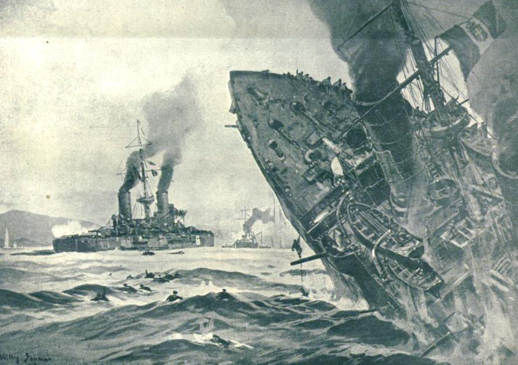 Potopljena italijanska oklopna križarka Giuseppe Garibaldi